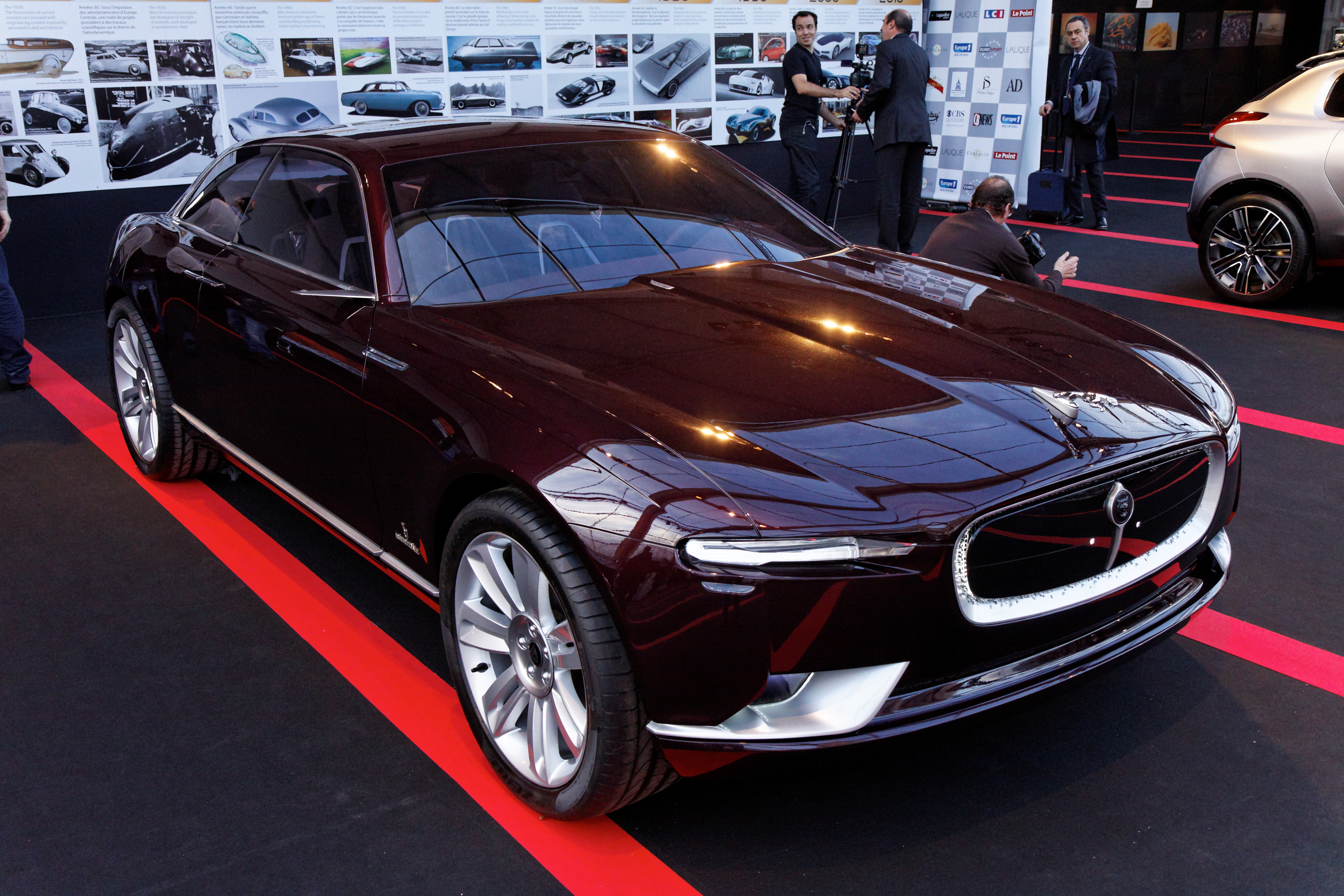 Bertone Jaguar B99